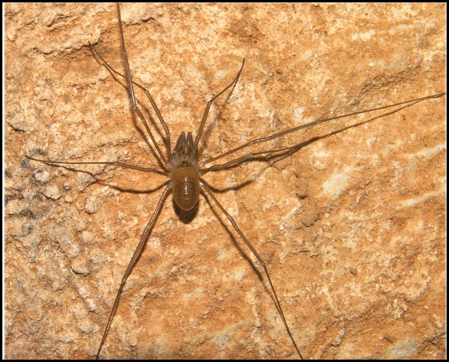 Sabacon paradoxum en vue dorsale. Grotte, ouest de l' Hérault.